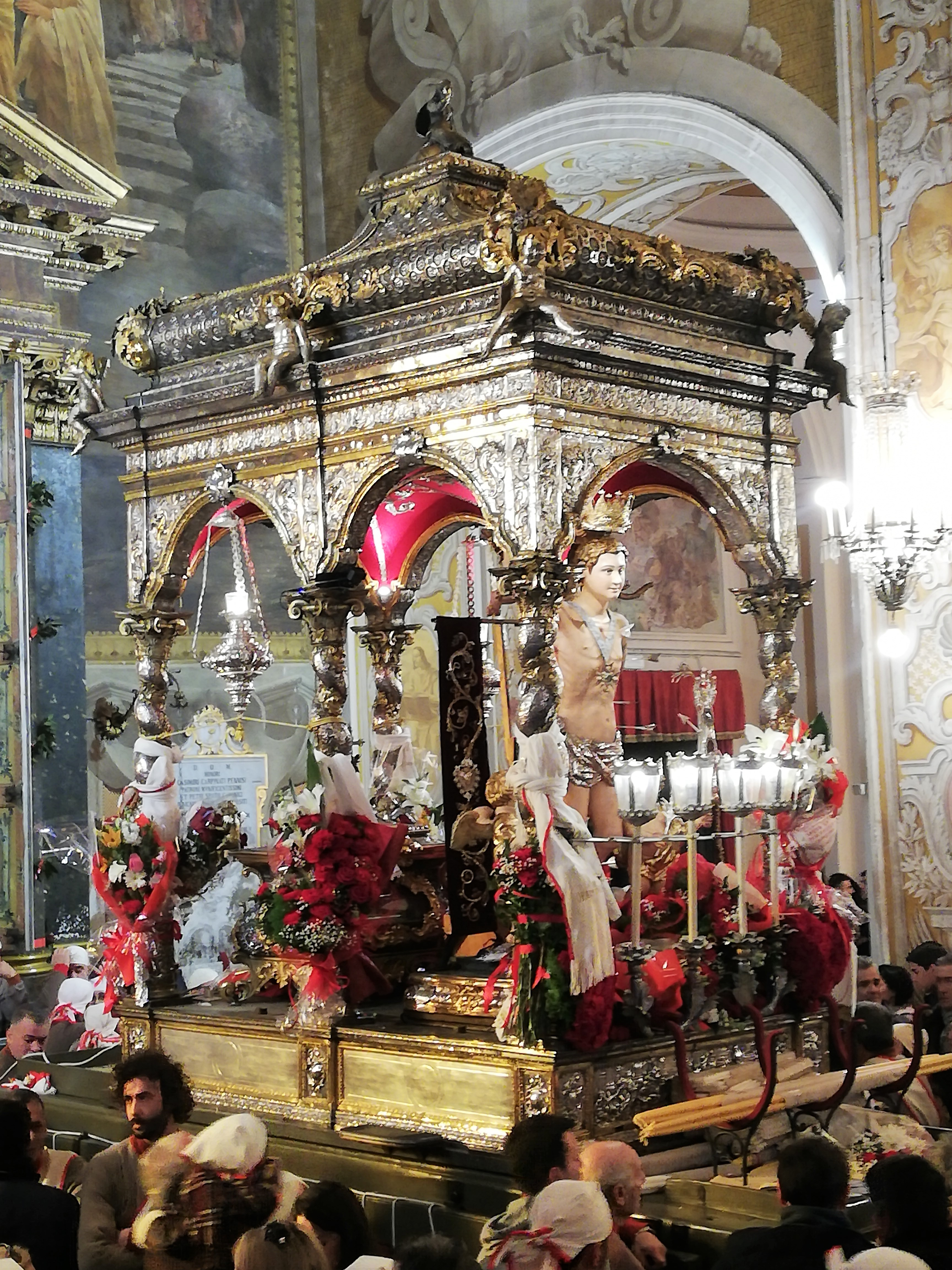 Fercolo o vara di San Sebastiano, fasi preparatorie uscita 23 gennaio 2020.